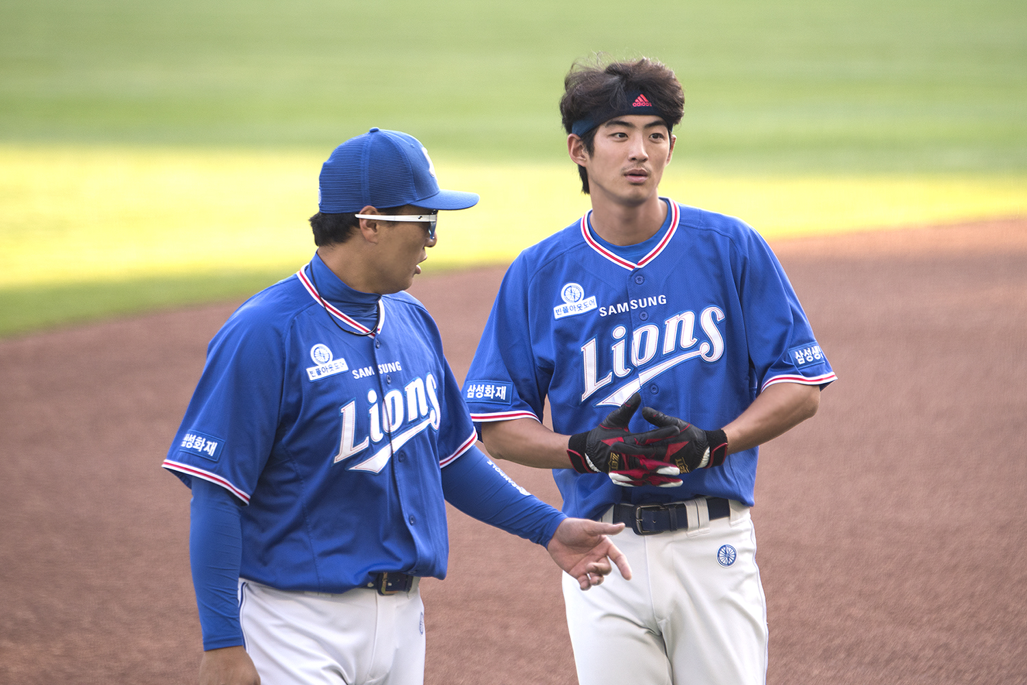 2017 09 01 삼성 vs SK 굿바이 라이온킹 1